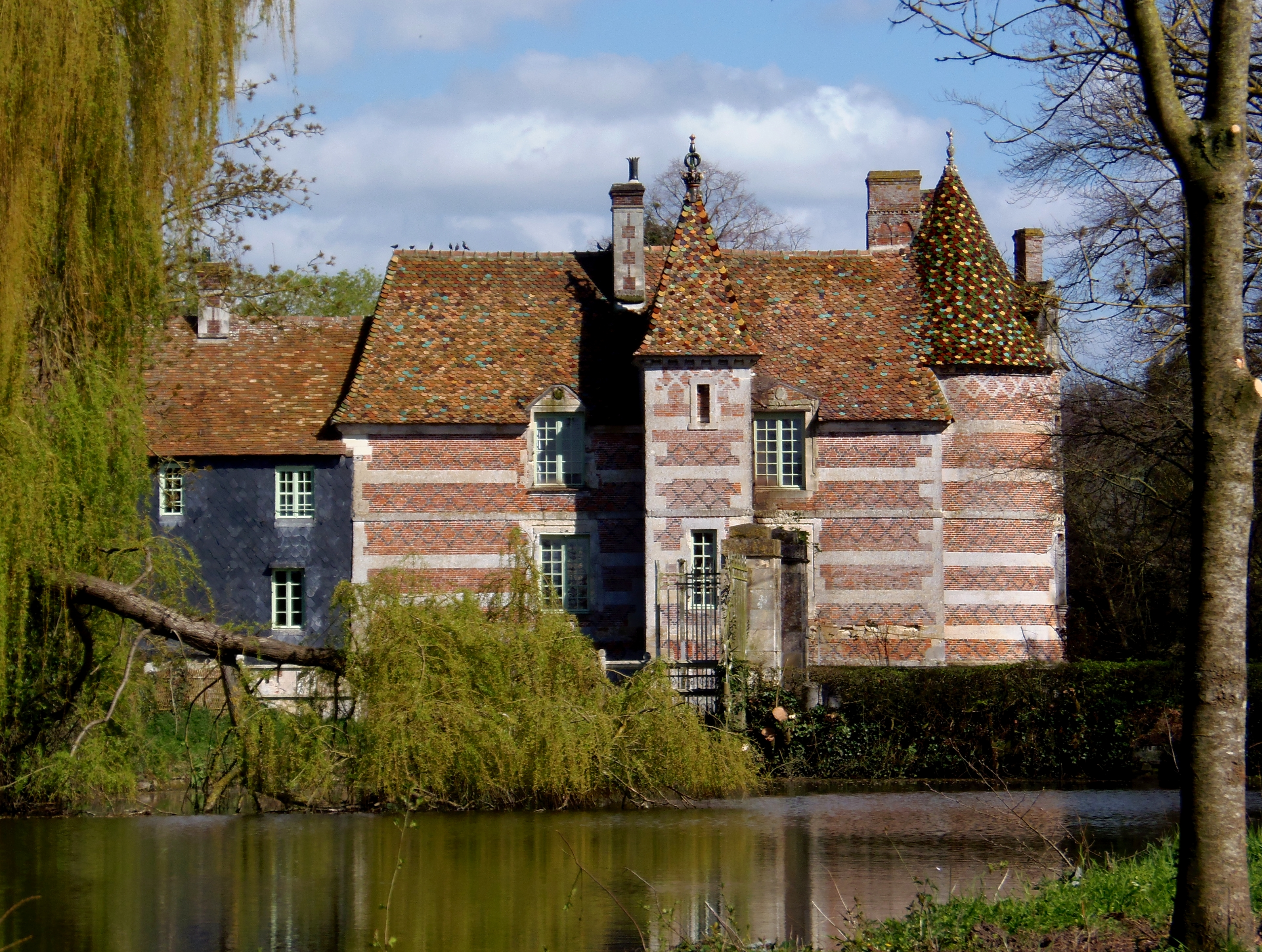 Victot-Pontfol (Normandie, France). Le château de Victot.